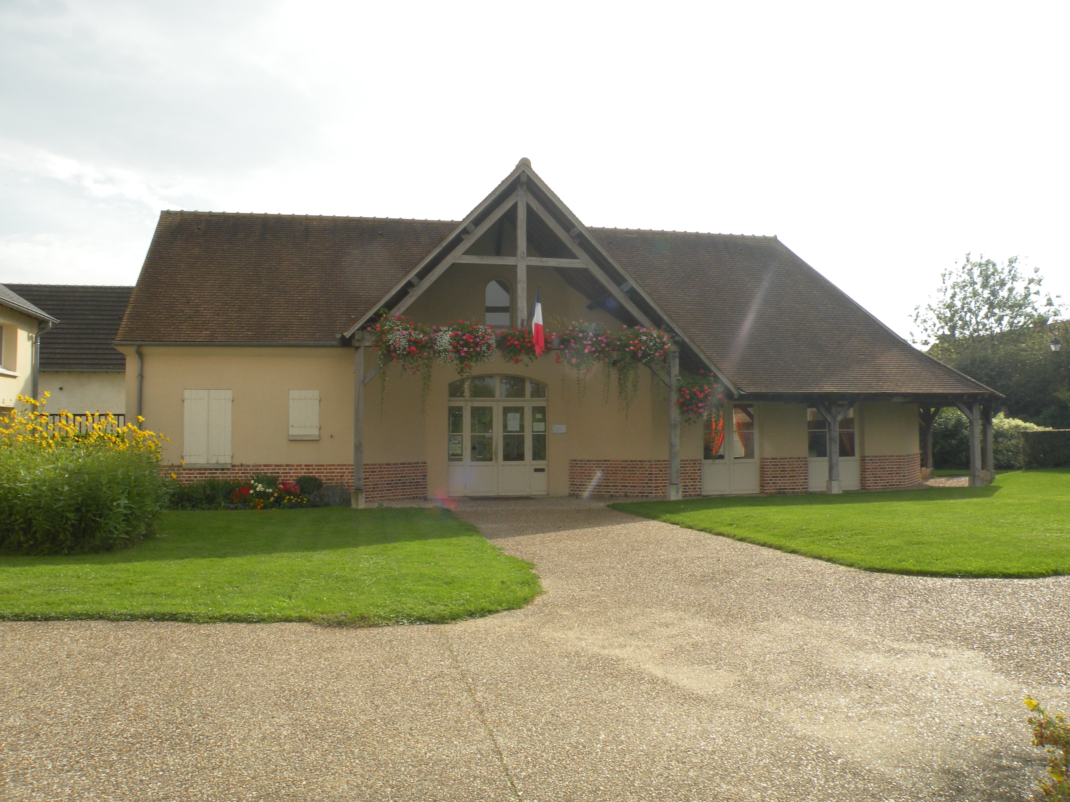 Courcelles-lès-Gisors mairie